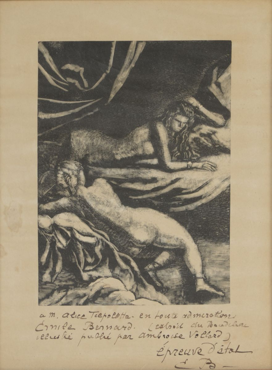 Ilustración para Les Fleurs du mal de Charles Baudelaire (1916), Émile Bernard.